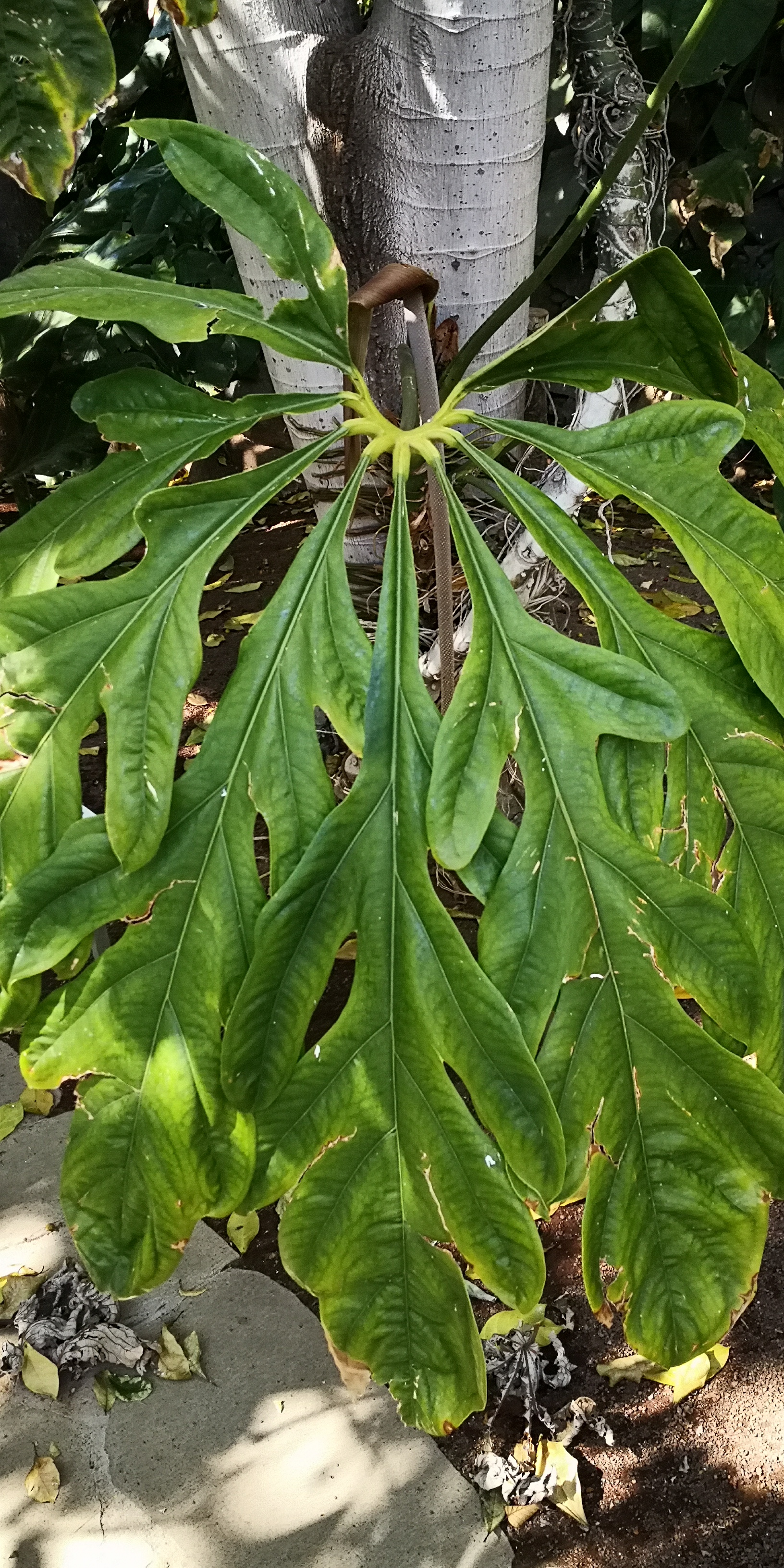 Standort: Palmetum in Santa Cruz de Tenerife, Kanarische Inseln, Spanien. Februar 2020. 28,452 -16,256